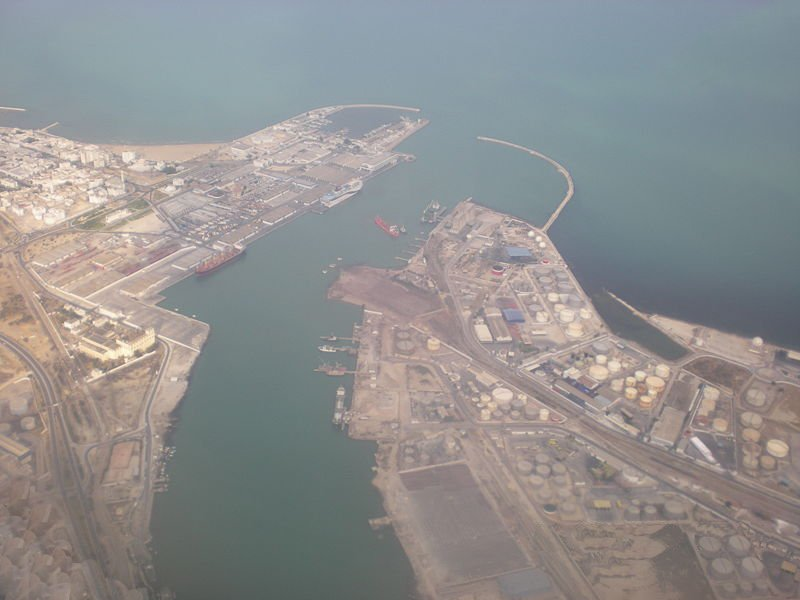 Rades's Harbour and La Goulette's Harbour, Tunisia